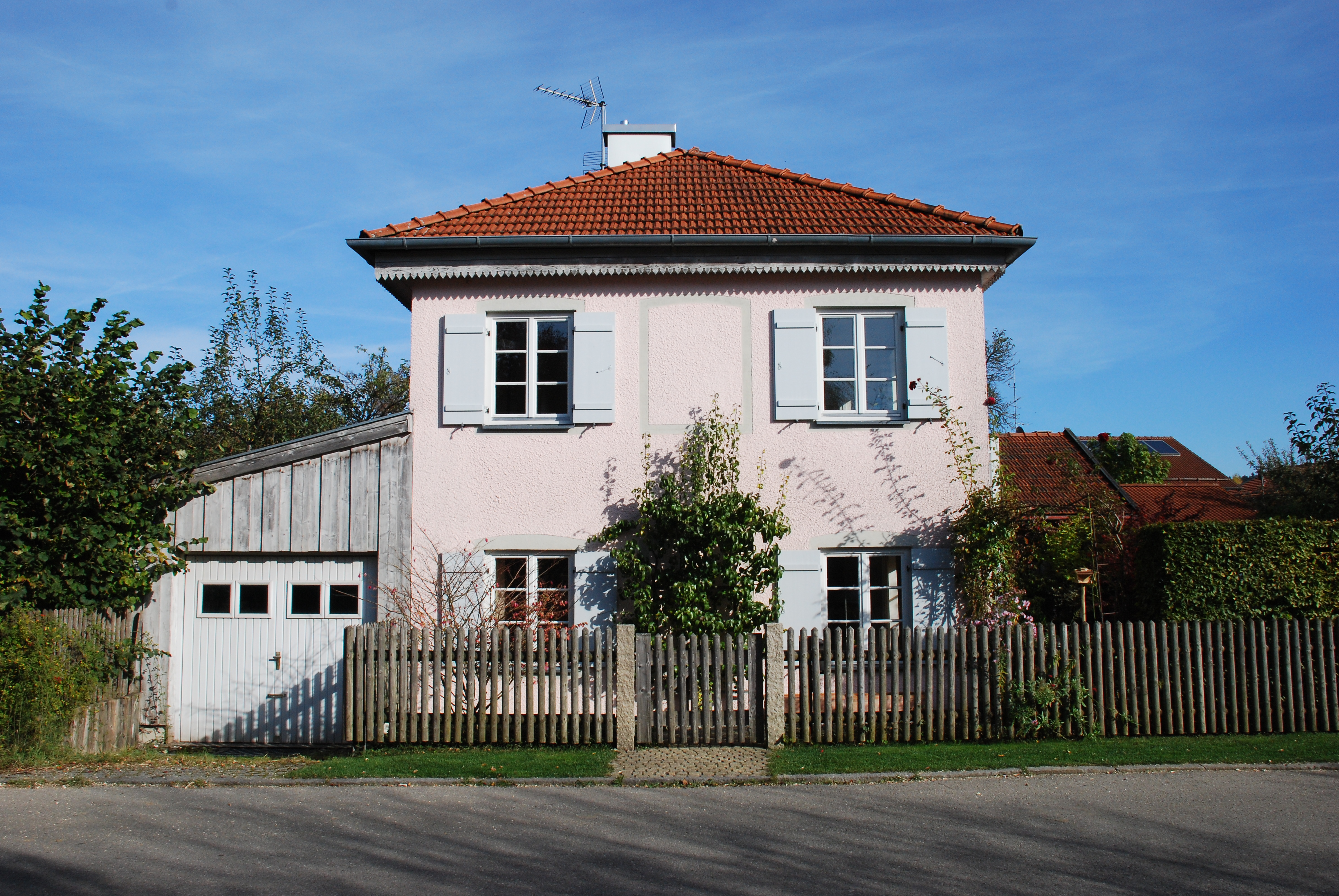 Ehemaliges Schulhaus in der Peißer Straße 13 in Aying, Landkreis München, Regierungsbezirk Oberbayern, Bayern. Als Baudenkmal in der Bayerischen Denkmalliste aufgeführt. Foto gemäß den Voraussetzungen zur Panoramafreiheit von öffentlicher Verkehrsfläche aus aufgenommen.